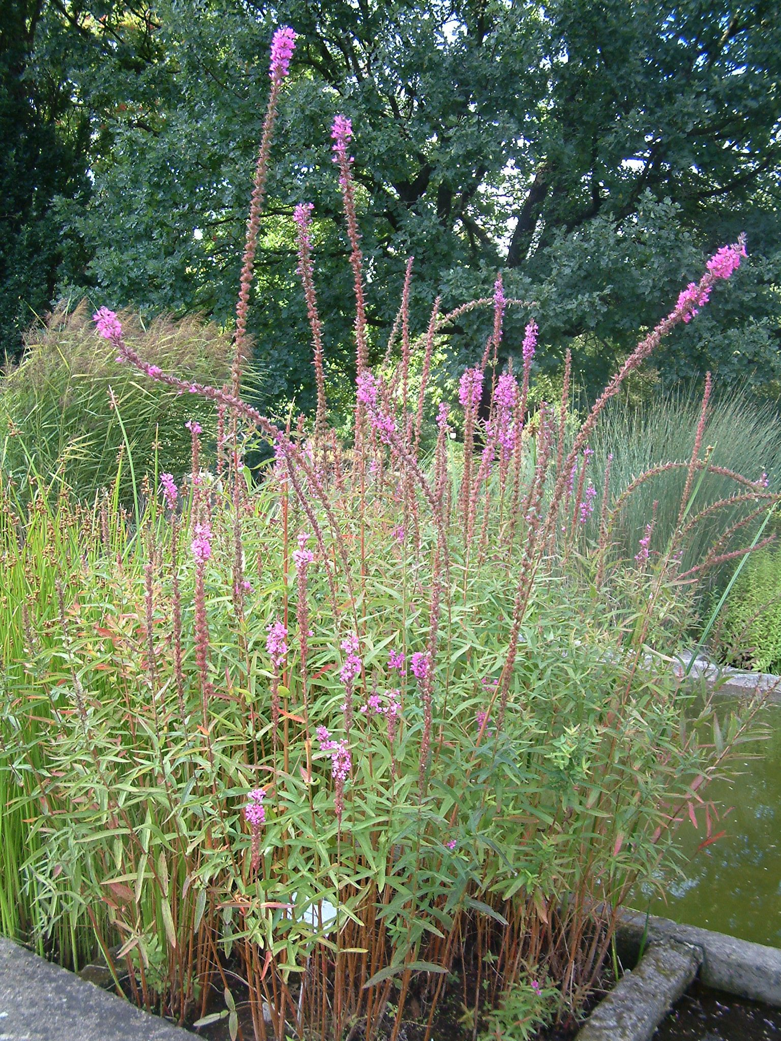 Lythrum virgatum, Botanical Garden in Poznań